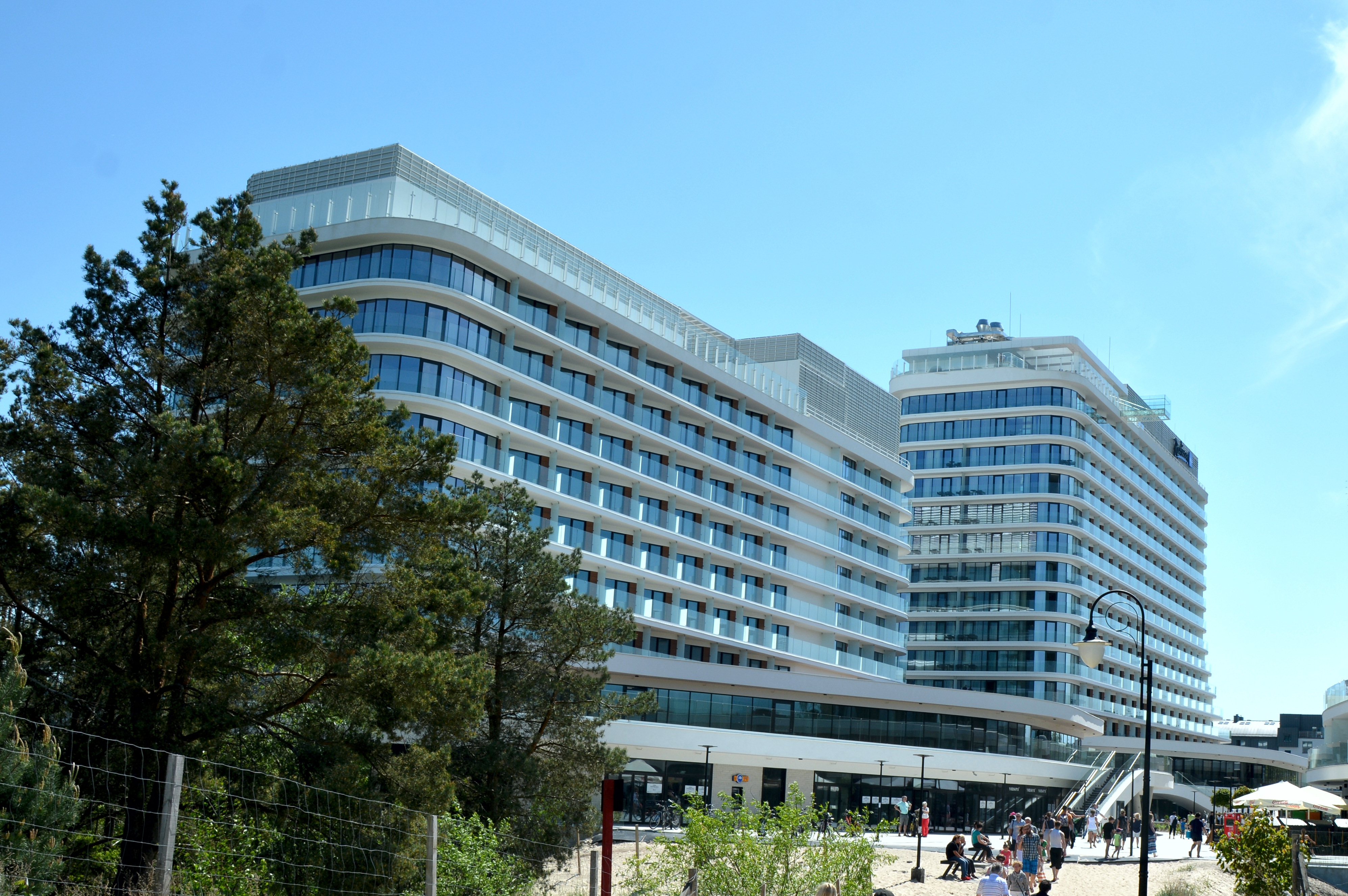 Hotel Radisson Blu w Świnoujściu